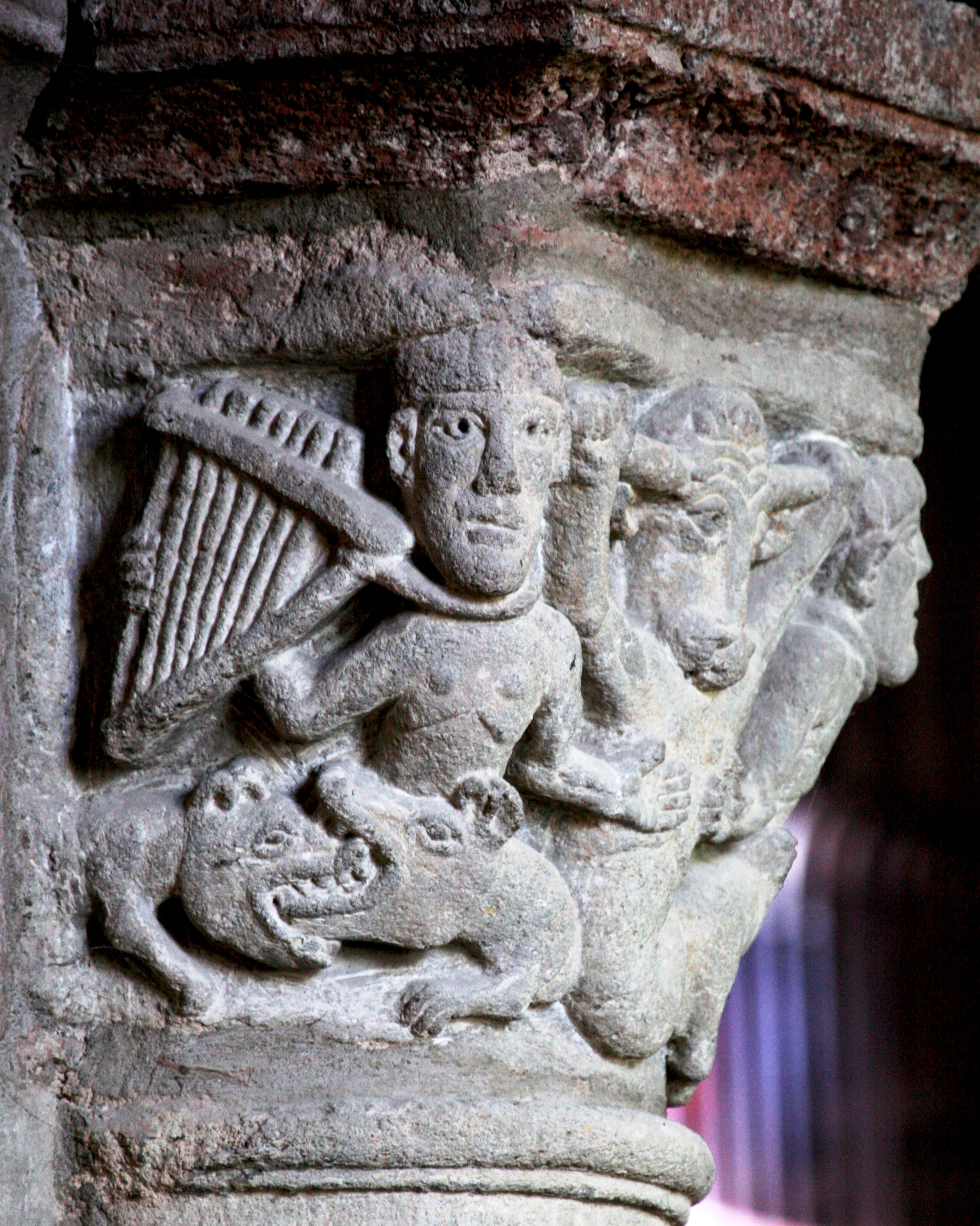 minotaure de Brioude d'après la thèse de Fabien vivier